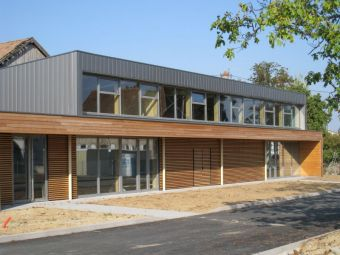 Photo de la salle Robert Hasenfratz à Issenheim (68) inaugurée en 2010.